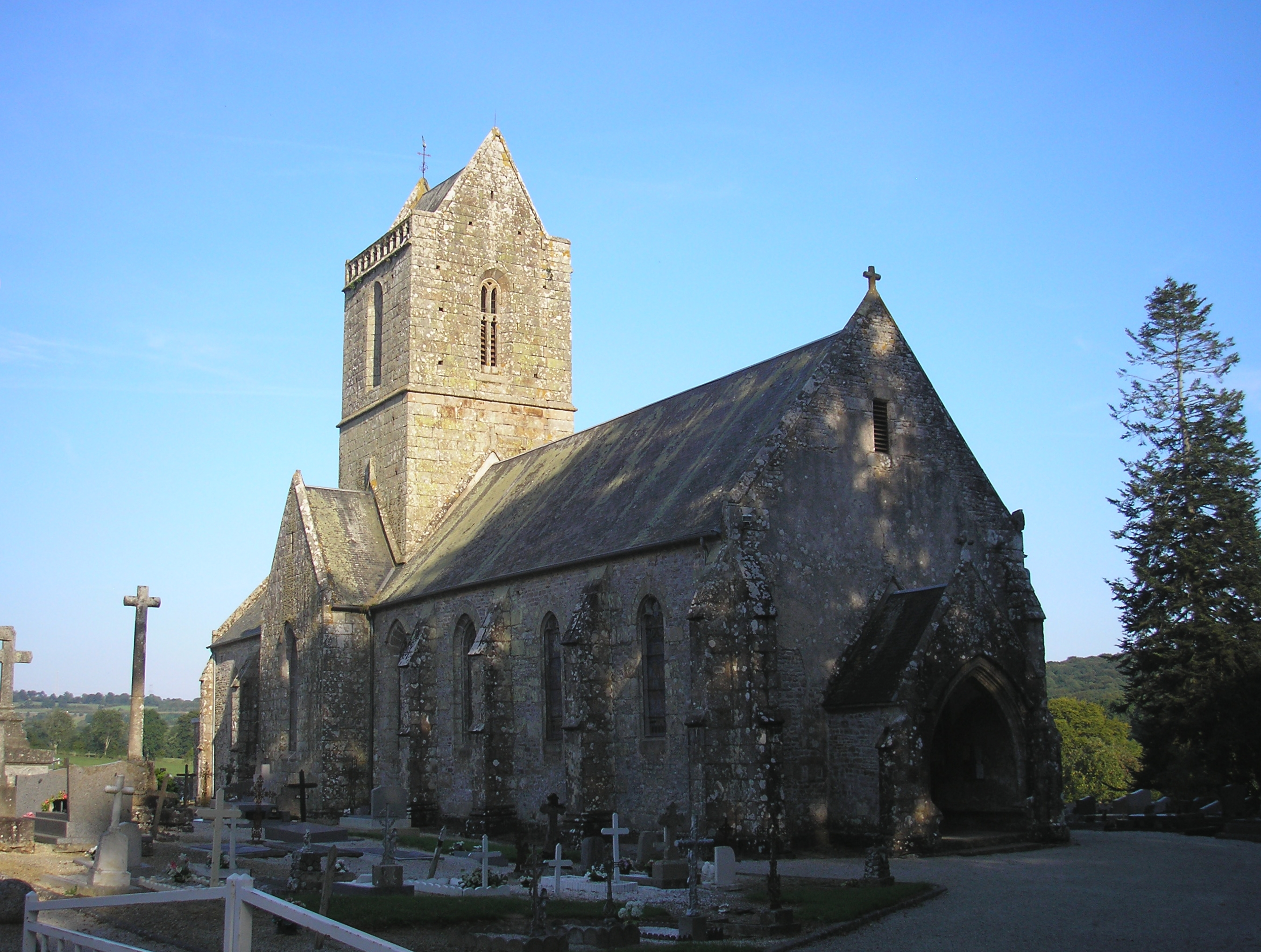 La Lande-d'Airou (Normandie, France). L'église Saint-Martin.